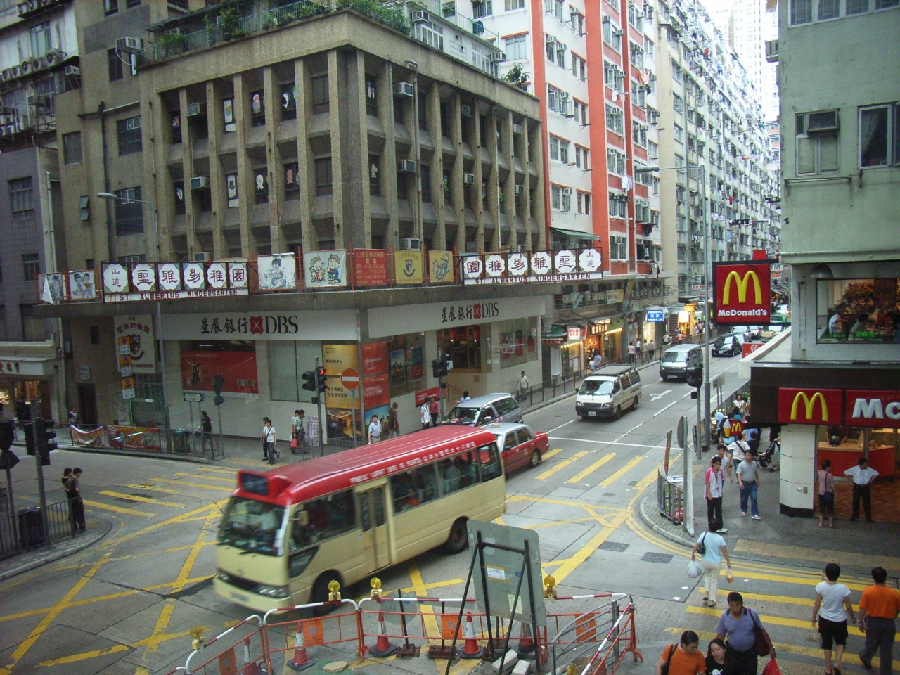 (User:Hillo STT 618) Hill Road, Shek Tong Tsui, Hong Kong